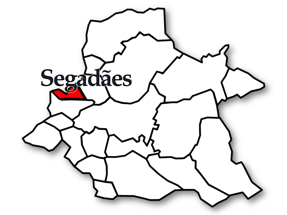 Censos 1864/2011